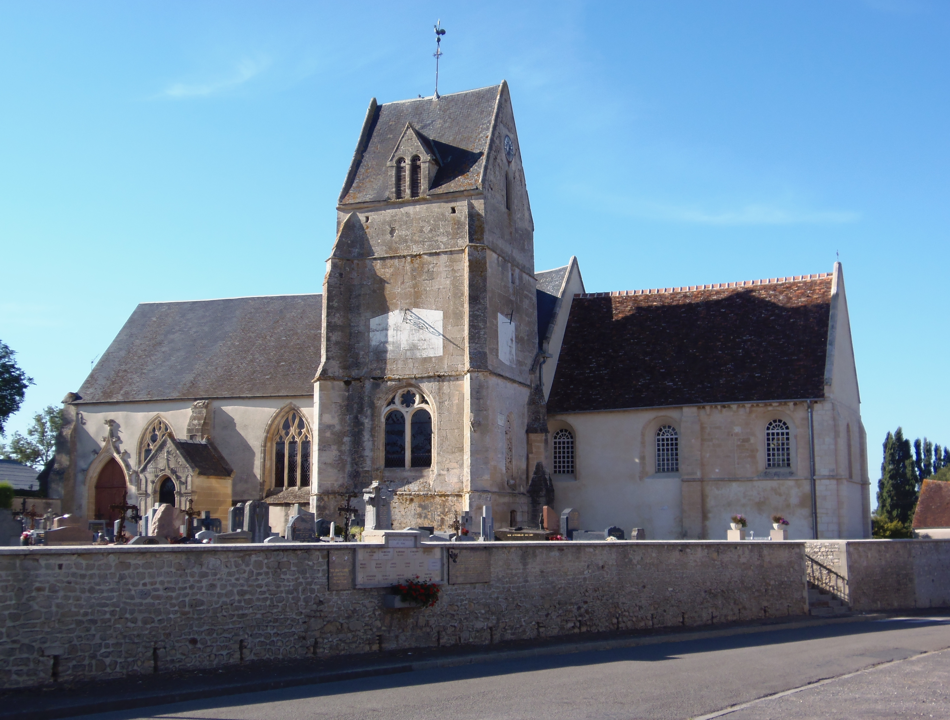 Tournai-sur-Dive (Normandie, France). L'église Saint-Paterne.